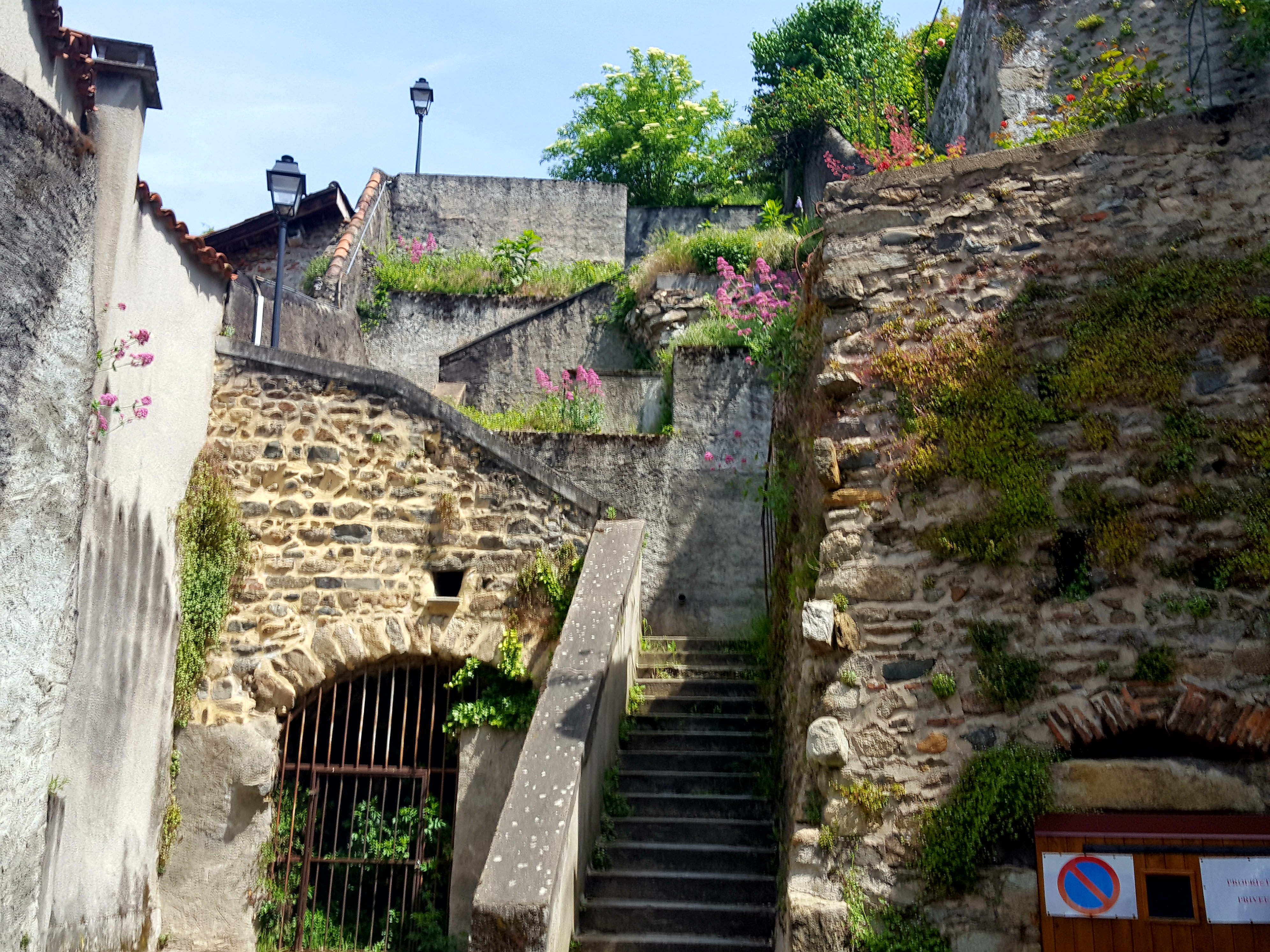 Thiers 63